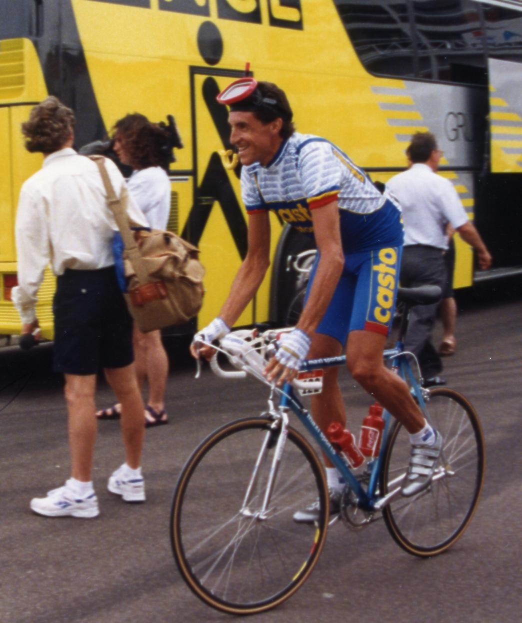 TOUR DE FRANCE 1993